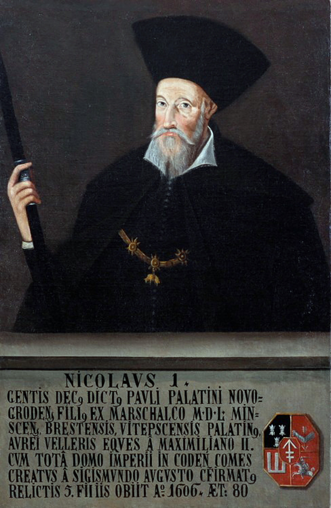 Беларуская (тарашкевіца): Партрэт Мікалая Сапегі (Mikałaj Sapieha) гербу «Ліс» (каля 1525 — 1599), дзяржаўнага дзеяча Вялікага Княства Літоўскага, маршалка гаспадарскага, ваяводы менскага, берасьцейскага і віцебскага.